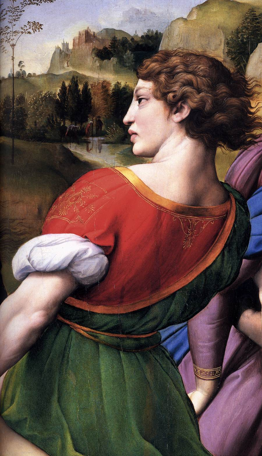 detail